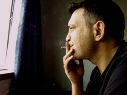 Gustavo Morales en entrevista realizada en julio de 2008